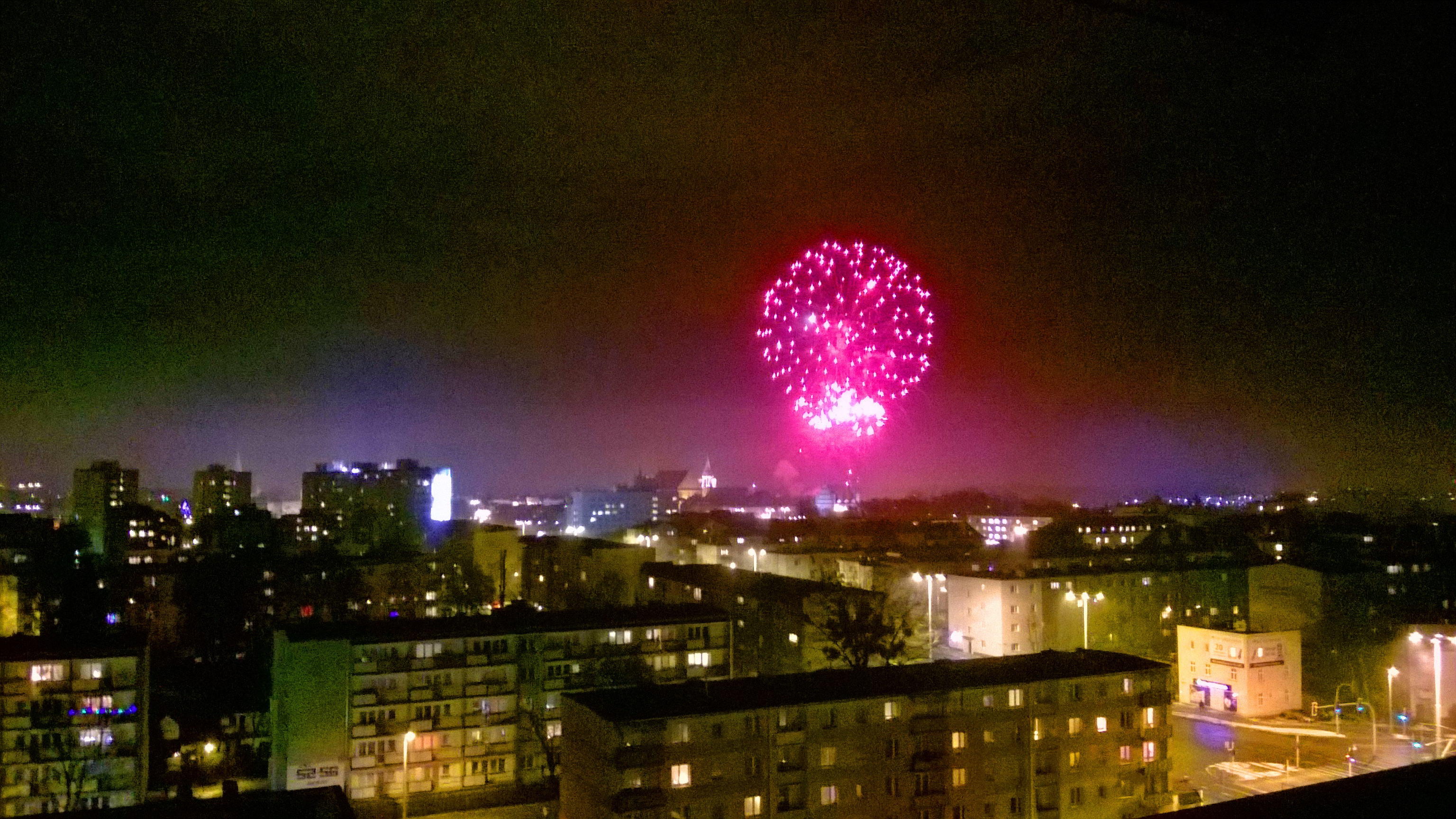 "Światełko do Nieba" podczas XXV finału WOŚP w Toruniu (2017)